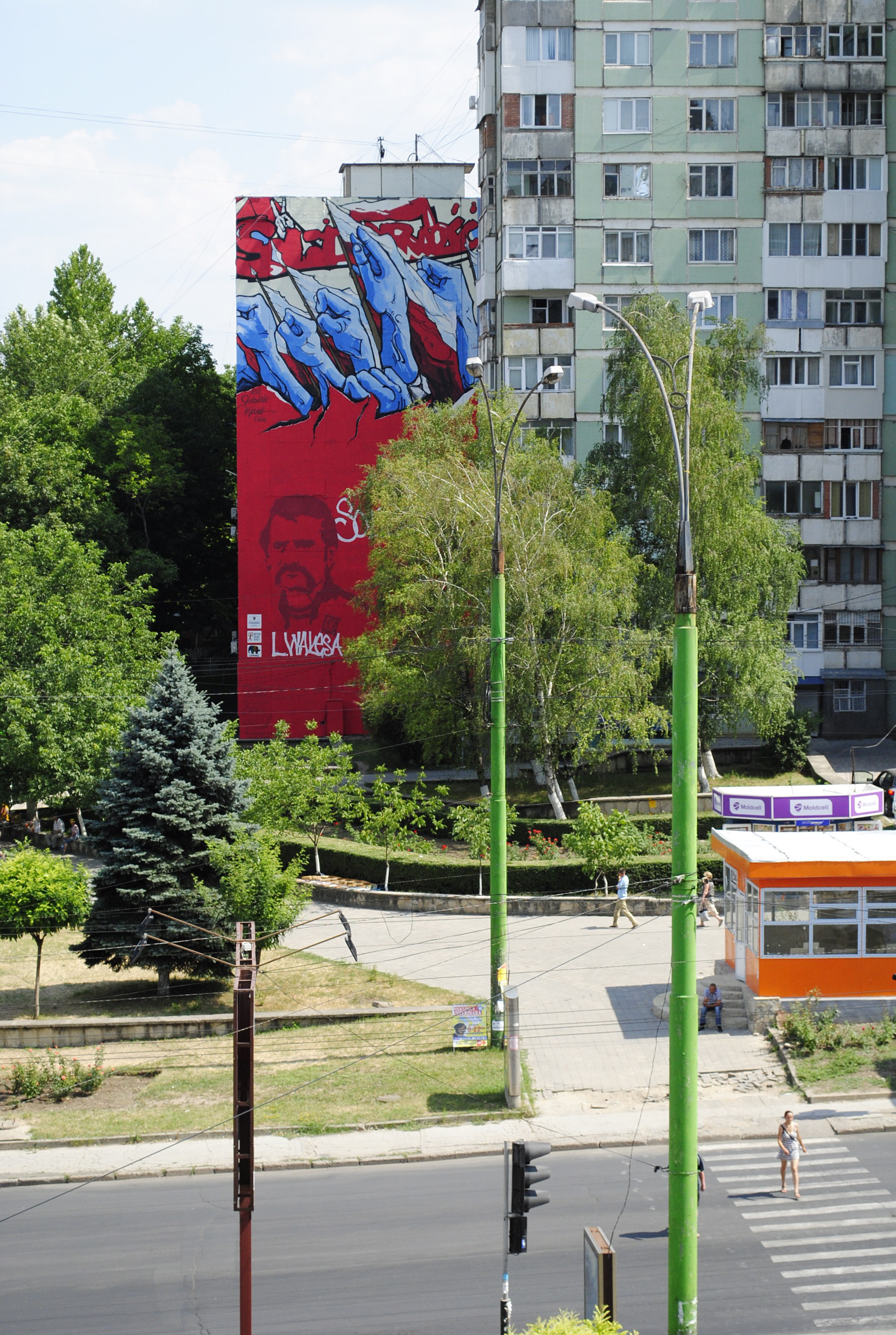 Rafał Roskowiński - materiały ze zbiorów autora.